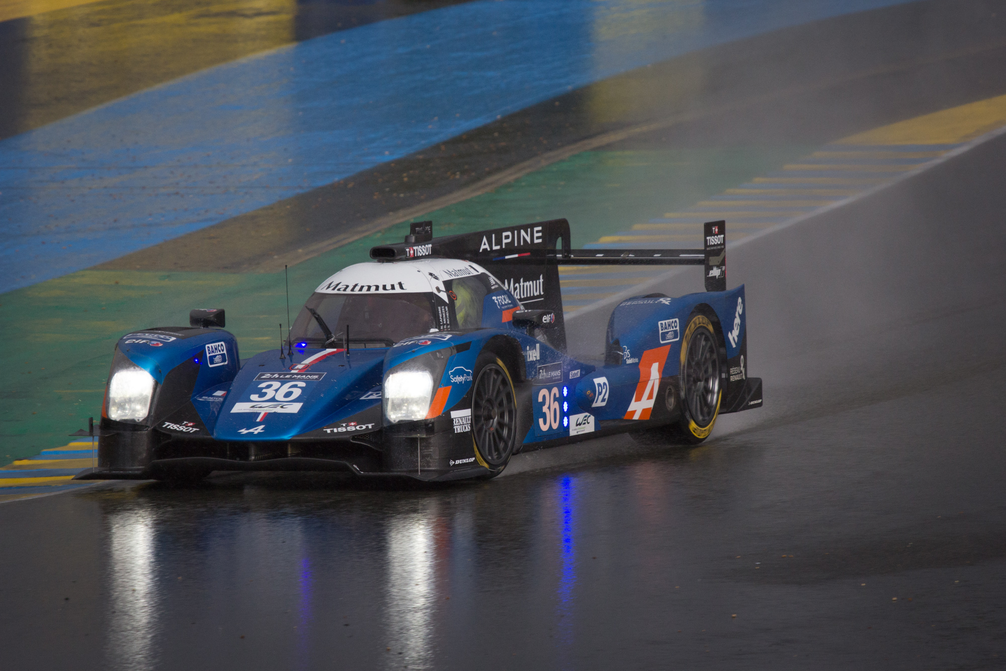 Drivers: Gustavo Menezes, Nicolas Lapierre, Stéphane Richelmi